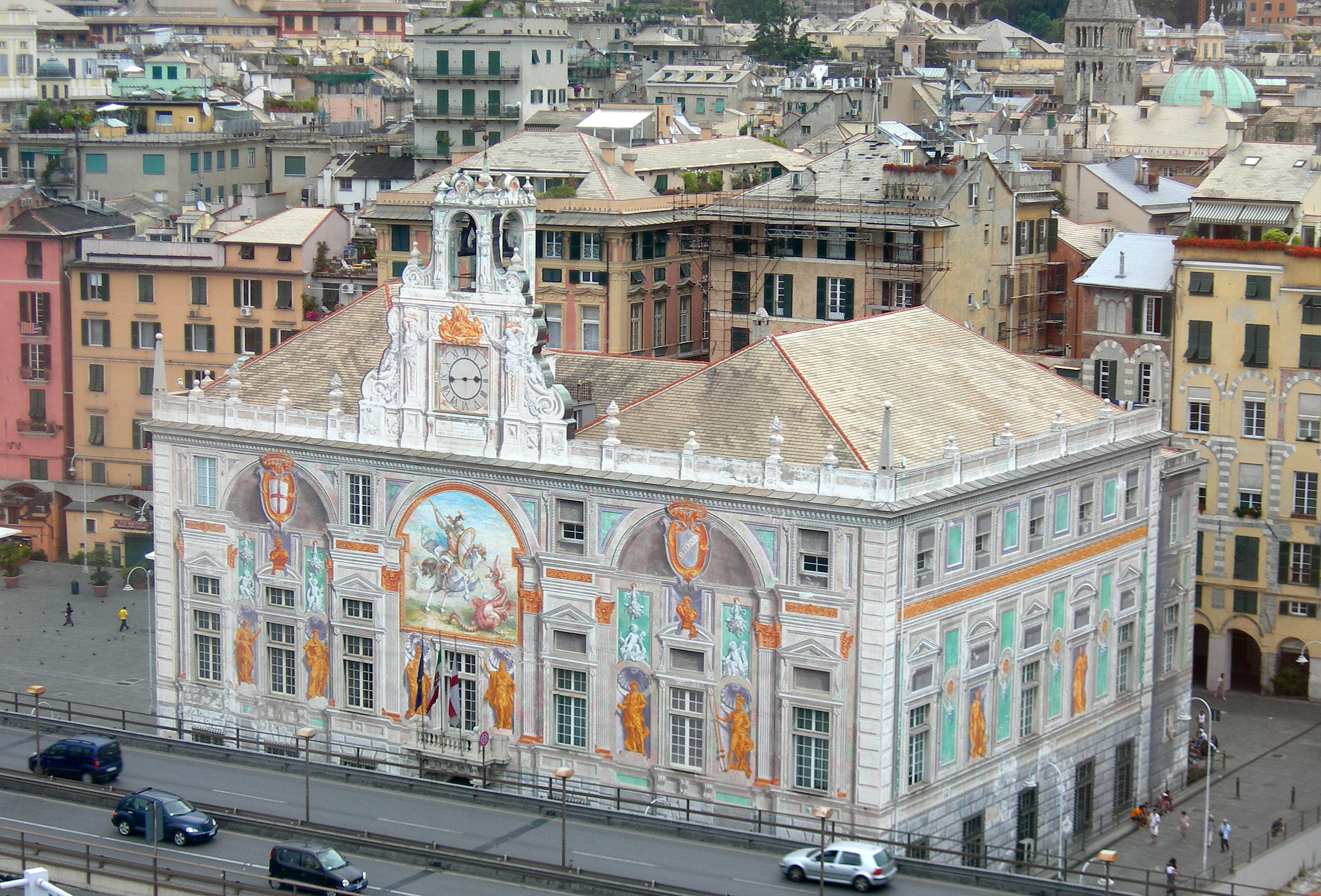 Facciata di Palazzo San Giorgio visto dal Bigo - Genova